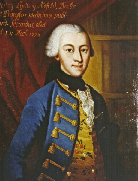 Prof. Georg Ludwig Alefeld, Photographie eines Gemäldes der Gießener Professorengalerie; auf einer Ansichtskarte des W. Schmitz Verlags, Text auf der Rückseite der Ansichtskarte: Georg Ludwig Alefeld (1732 - 1774), Vertreter der Medizin in Gießen (1762-1774). Er machte sich als Anatom und Chirurg einen Namen. (Aus der Professoren-Galerie der Universität Gießen)